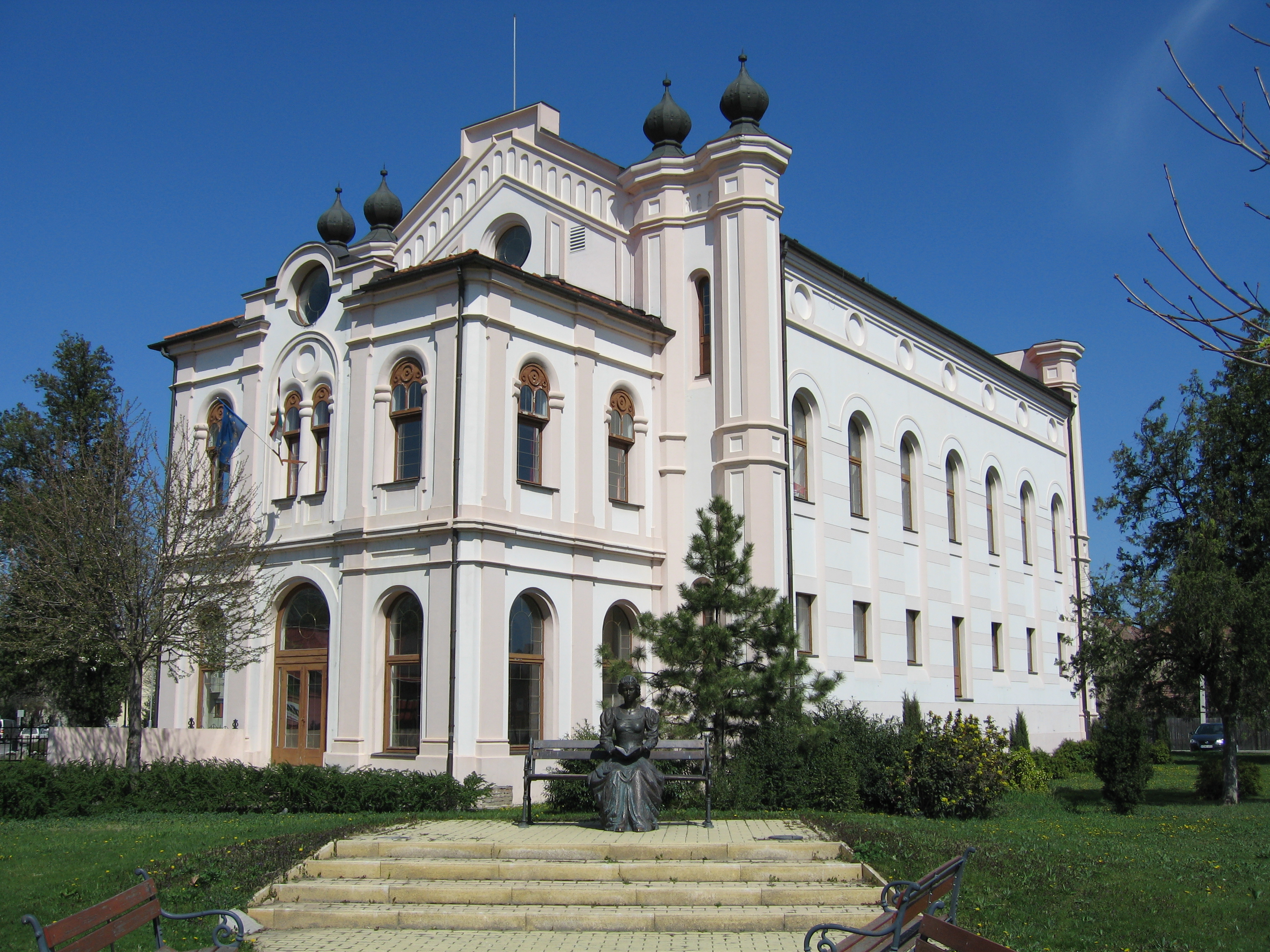 Szentesi zsinagóga (épült 1868–1872-ben Knábe Ignác tervei alapján, felújították 1997–1998-ban Terney László tervei szerint